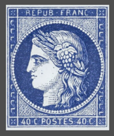 first stamps (1849) France Ceres Republique (un-issue) / France timbre Ceres 1849 non emis : 40 centimes bleu